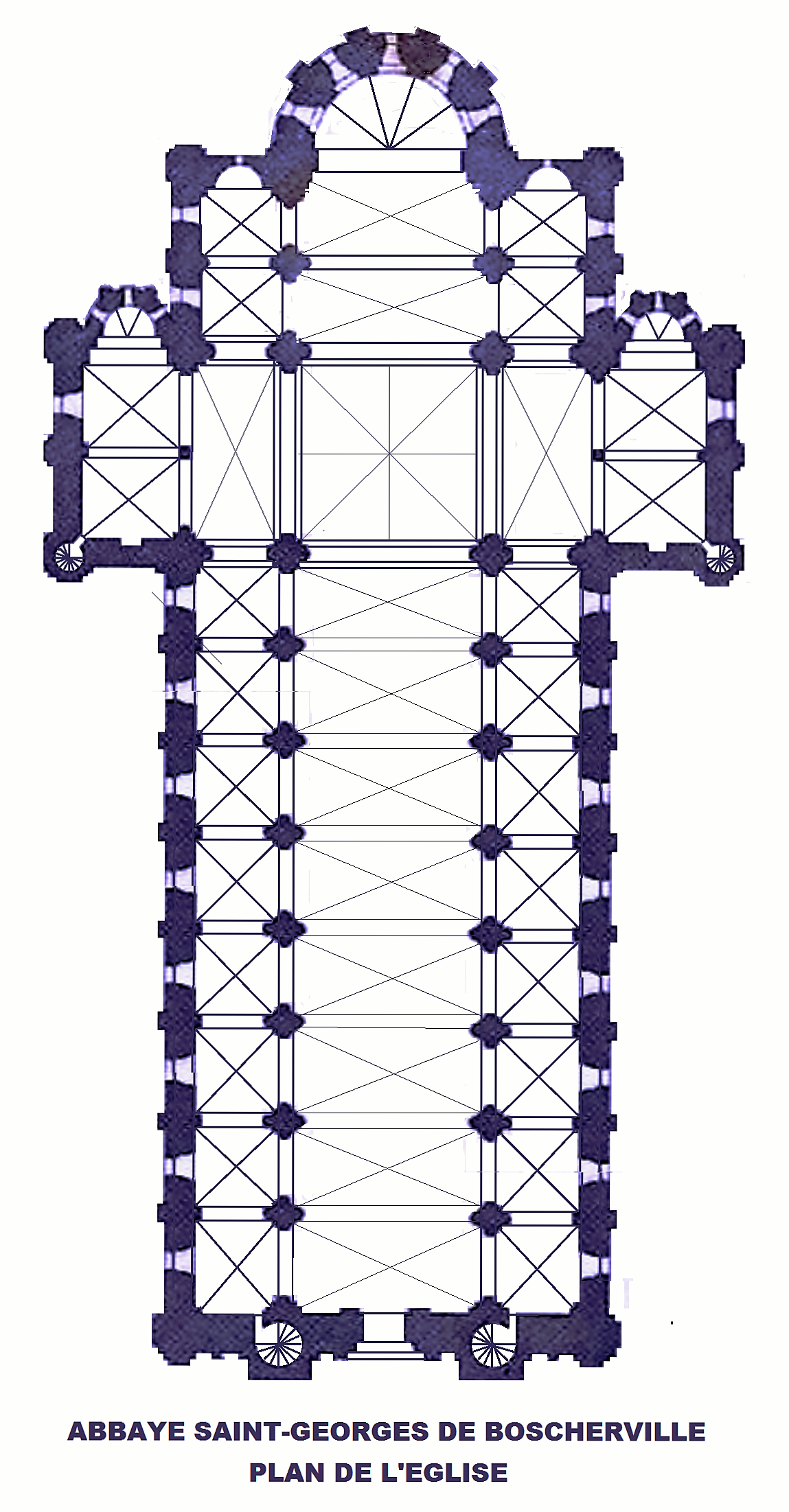 Abbaye Saint-Georges de Boscherville, Plan de l'église (image du domaine public modifiée, Ruprich Robert; 1820-1887)